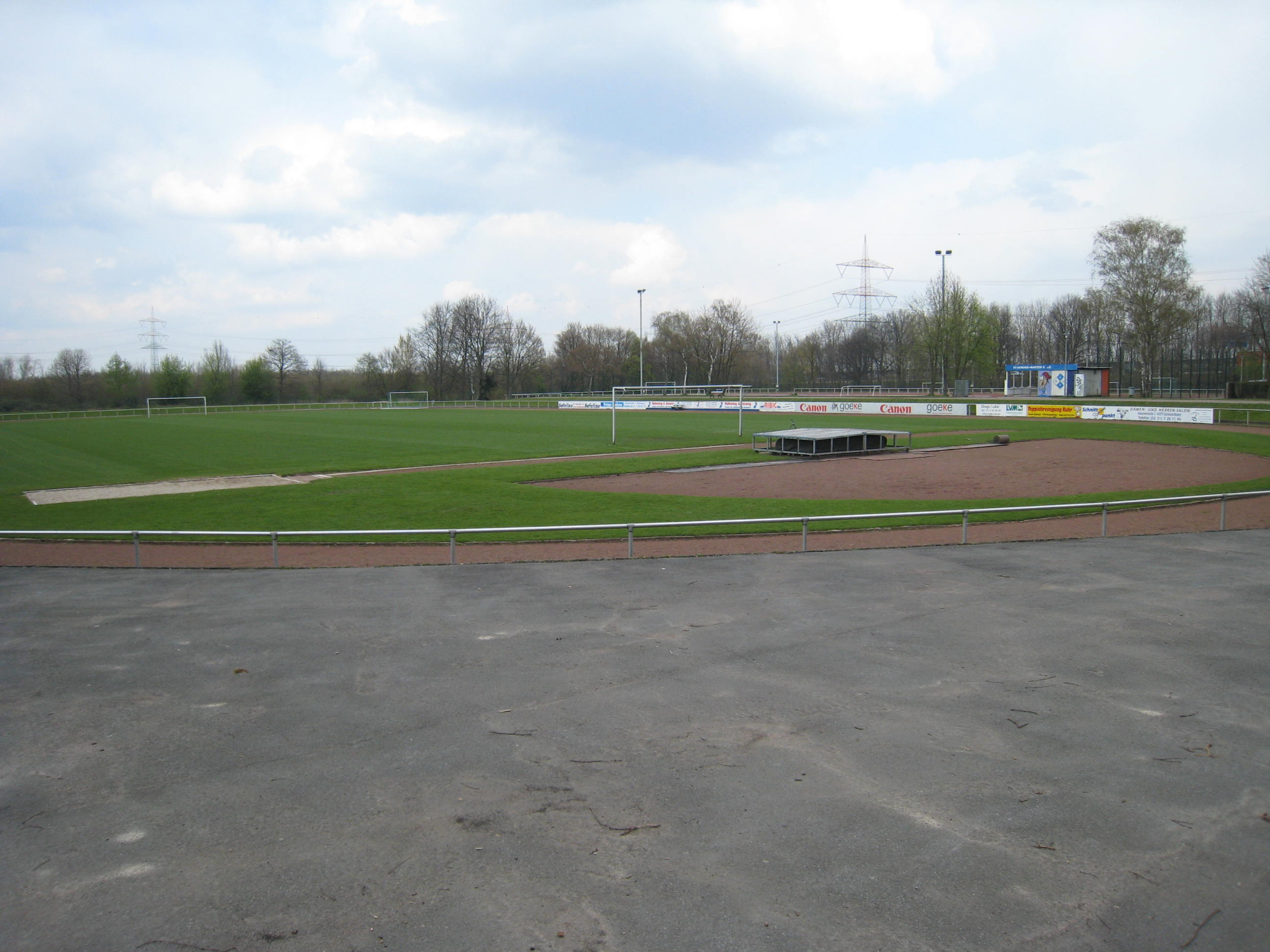 Sportanlage Am Wischlinger Weg